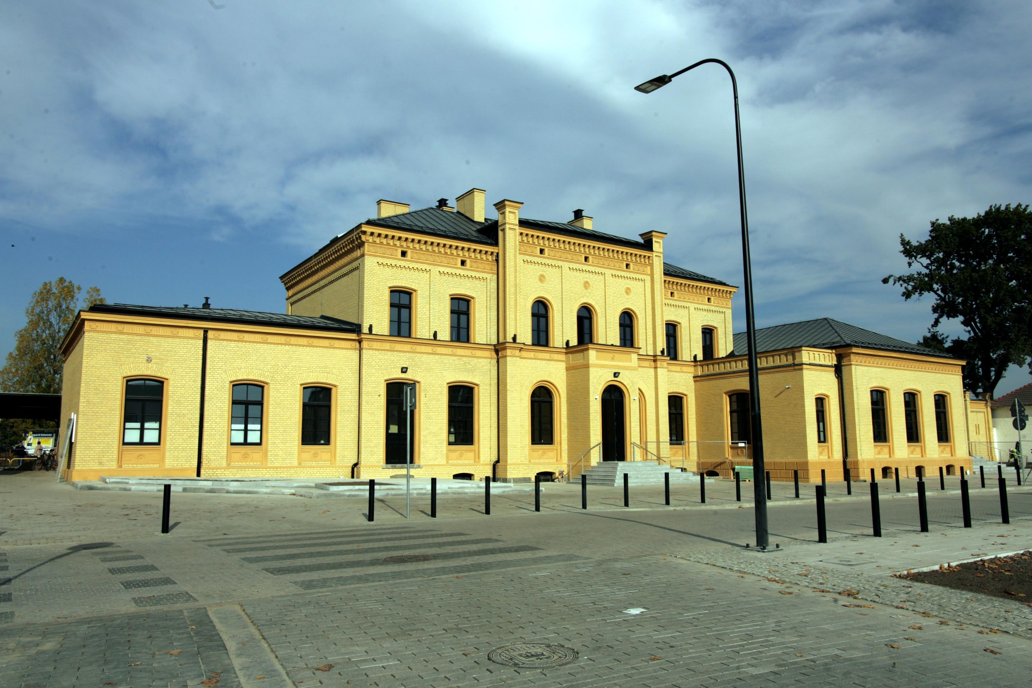 Stacja Kolejowa w Starogardzie